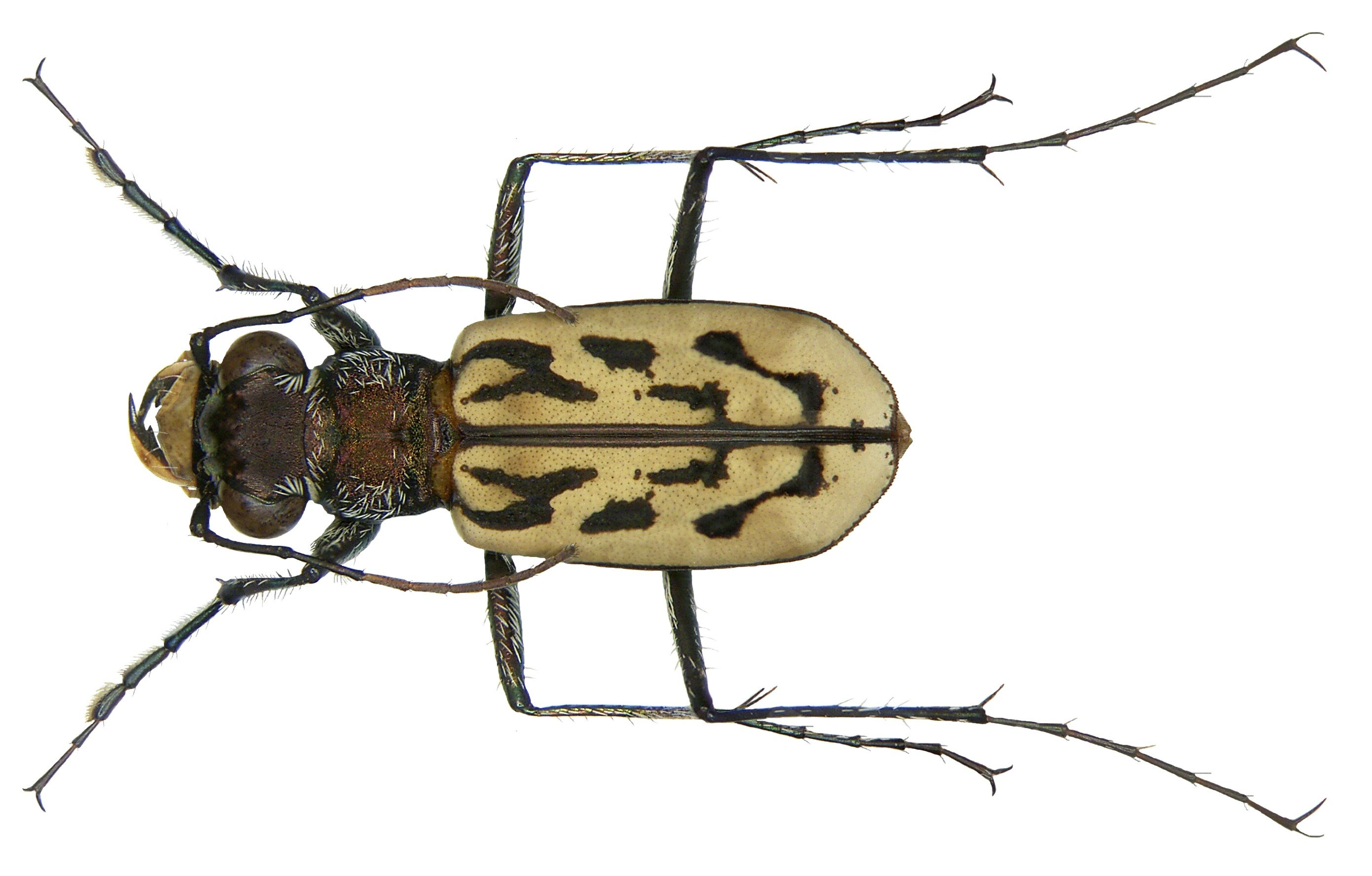 Familie: Carabidae Grösse: 12 mm Fundort: Namibia, Omaruru leg. U.Schmidt, 1994; det. J.Gebert Foto: U.Schmidt, 2007